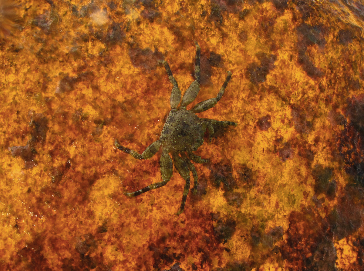 Plagusia squamosa à la Réunion.